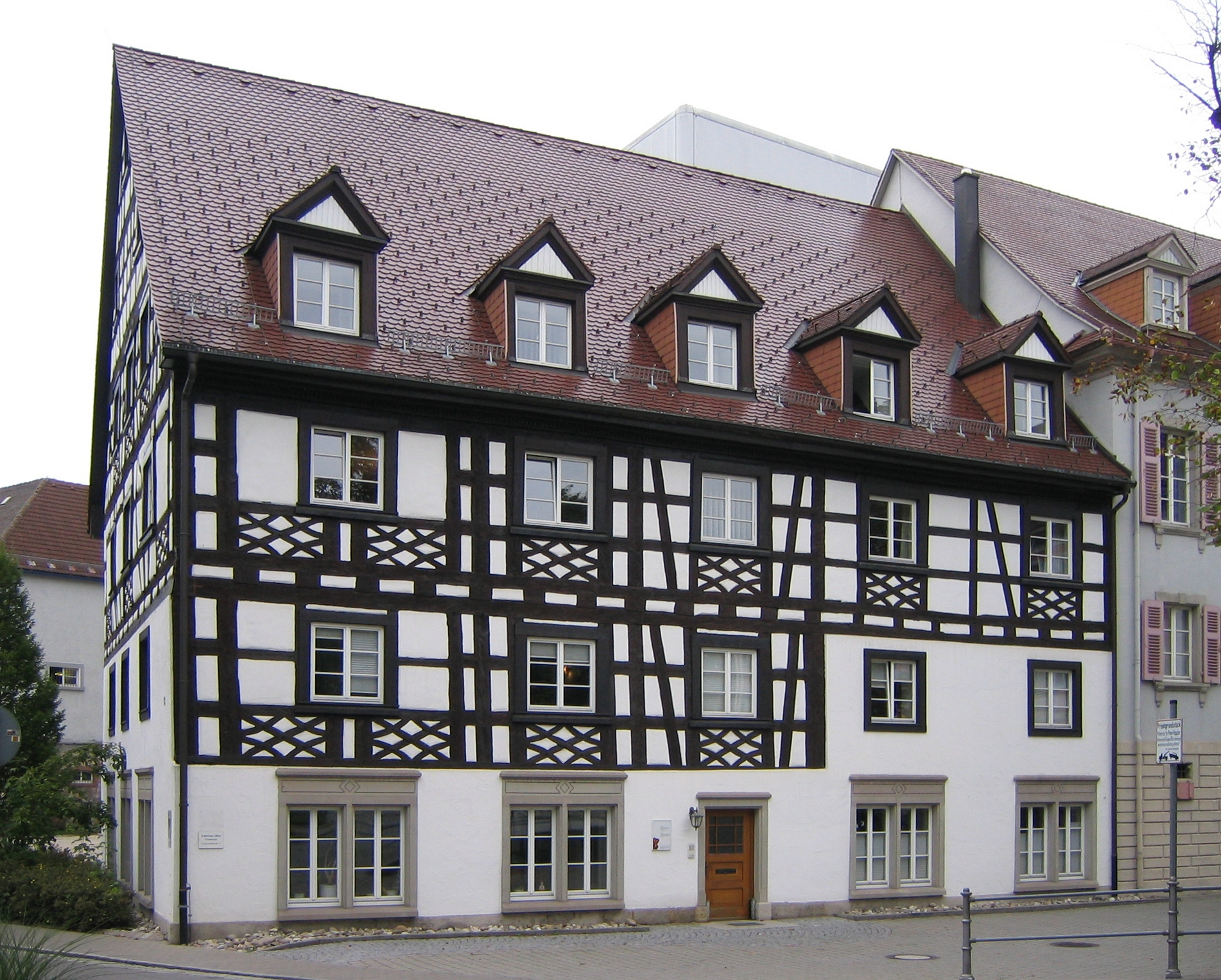 Gebäude der ehemaligen Falkenpost in Donaueschingen